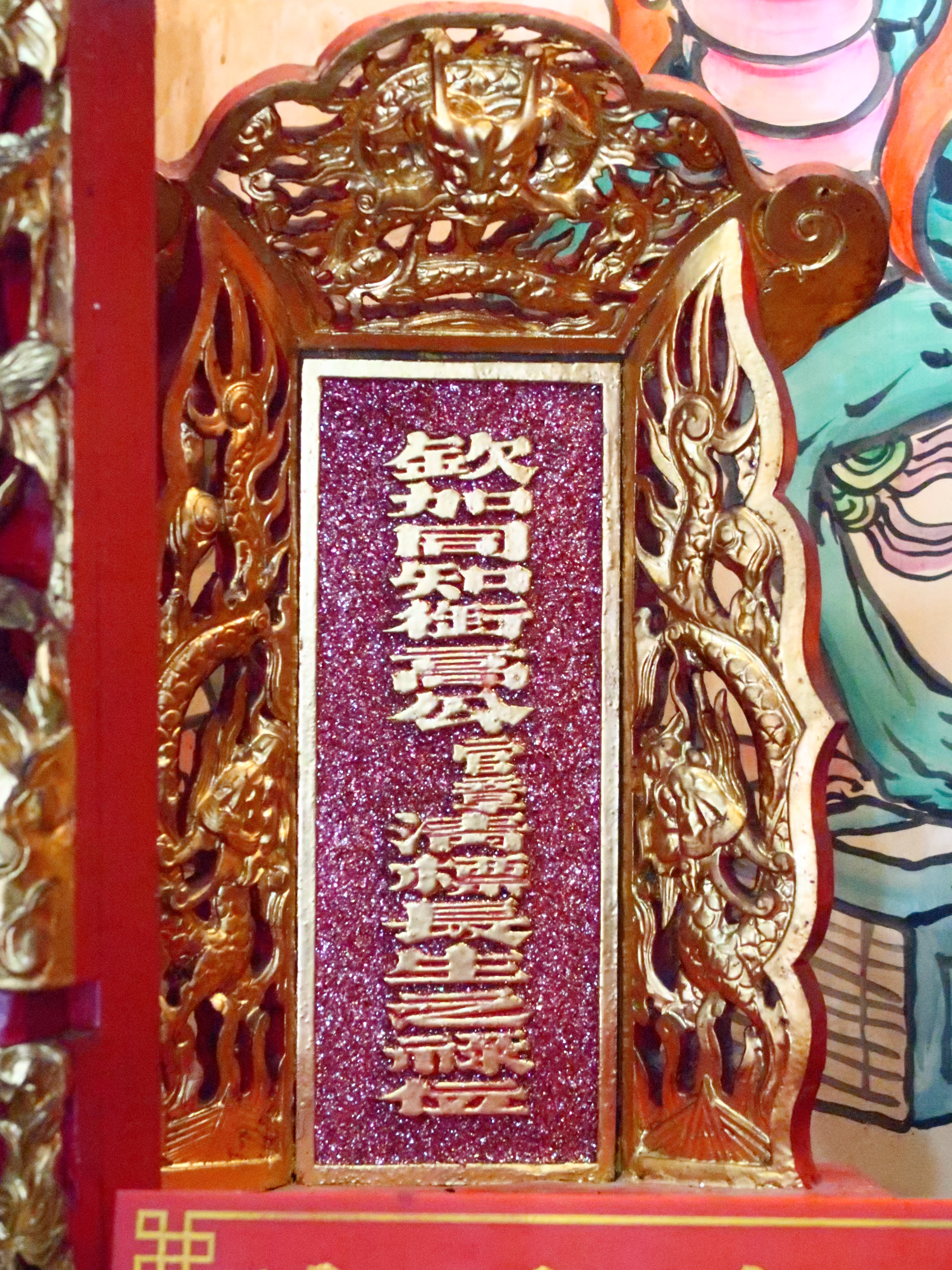 原臺灣清代班兵會館，舊稱祖承祠，主祀天上聖母